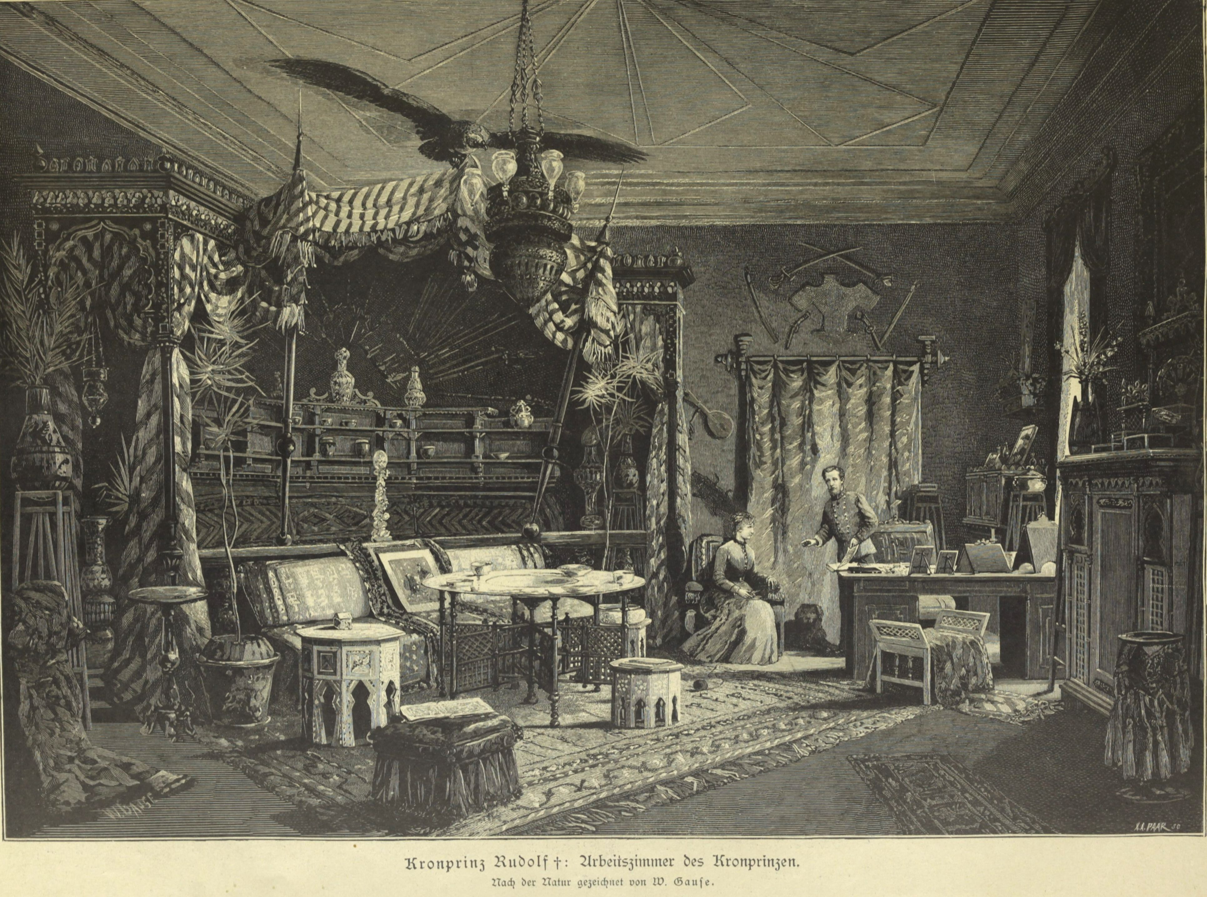 Rudolf dolgozószobája a Hofburgban (Törökszoba)